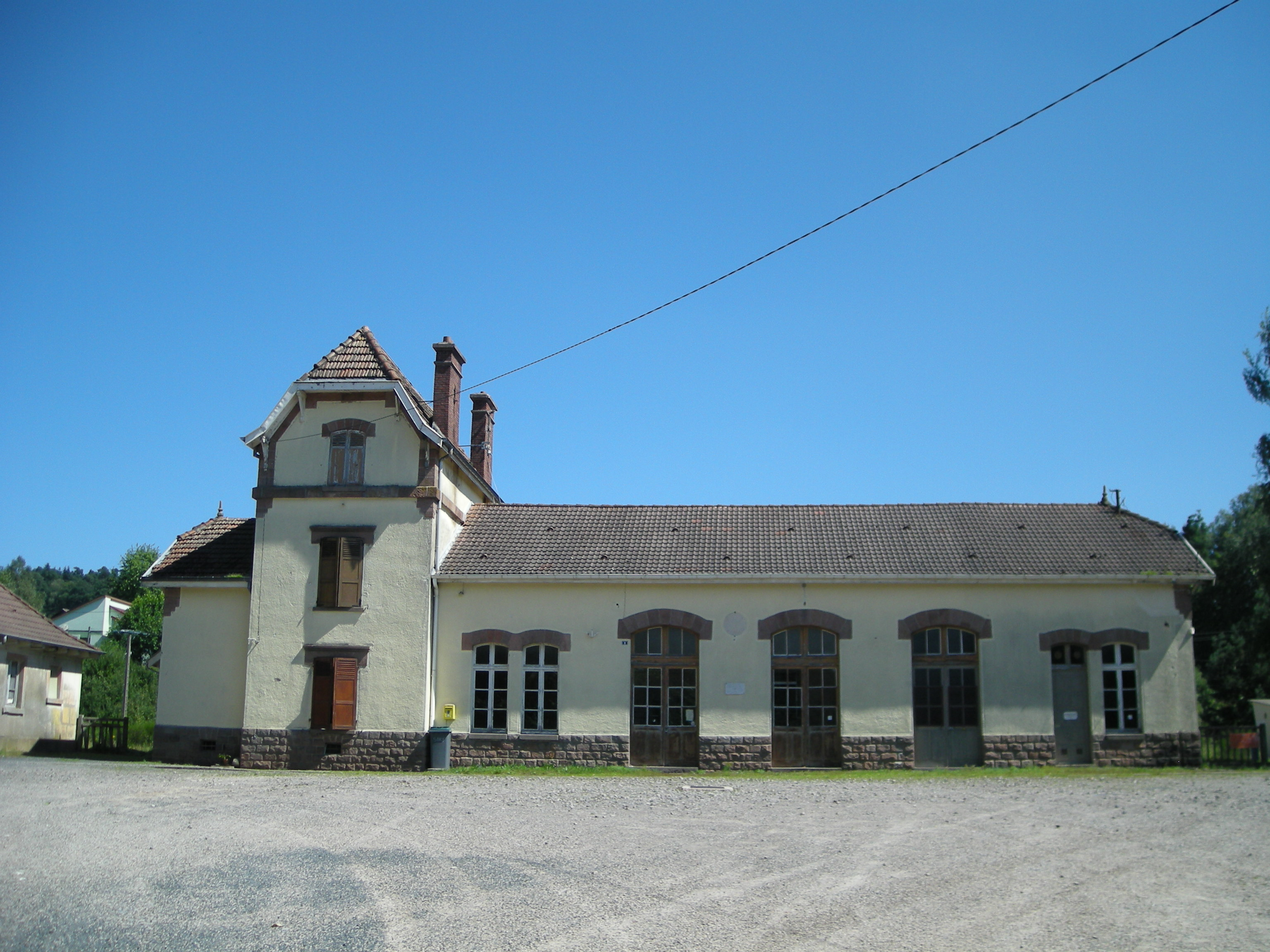 Gare de Provenchères-sur-Fave (Vosges, France)